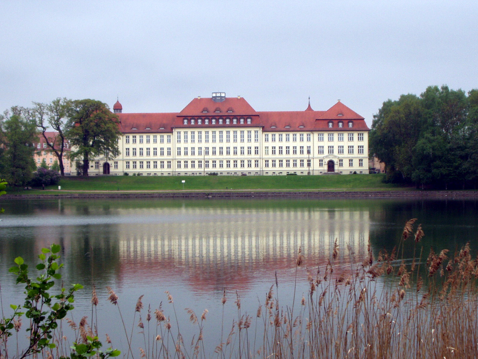 Gymnasium Carolinum am Glambecker See in Neustrelitz, Germany Taken May 2004